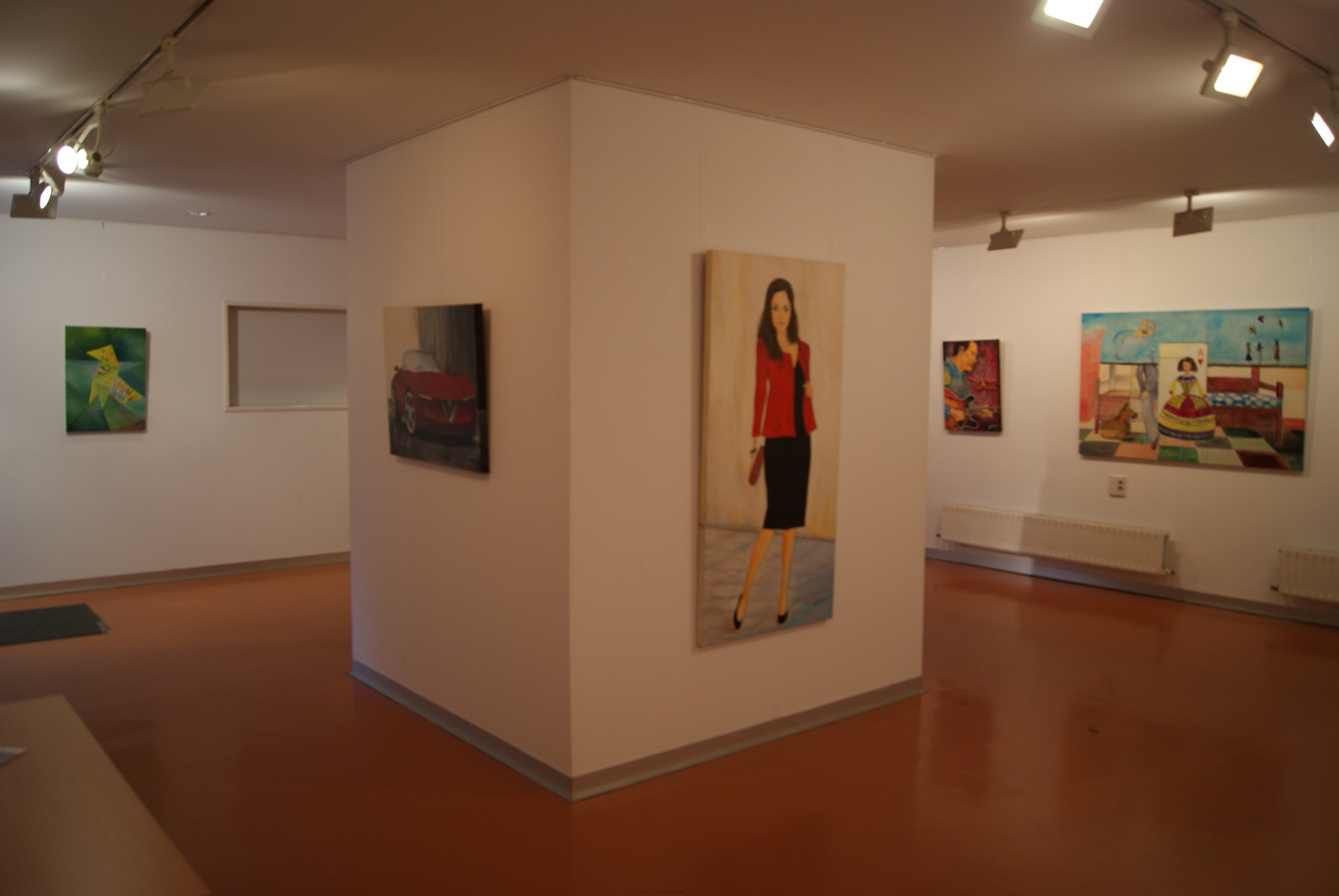 Exposición 2014